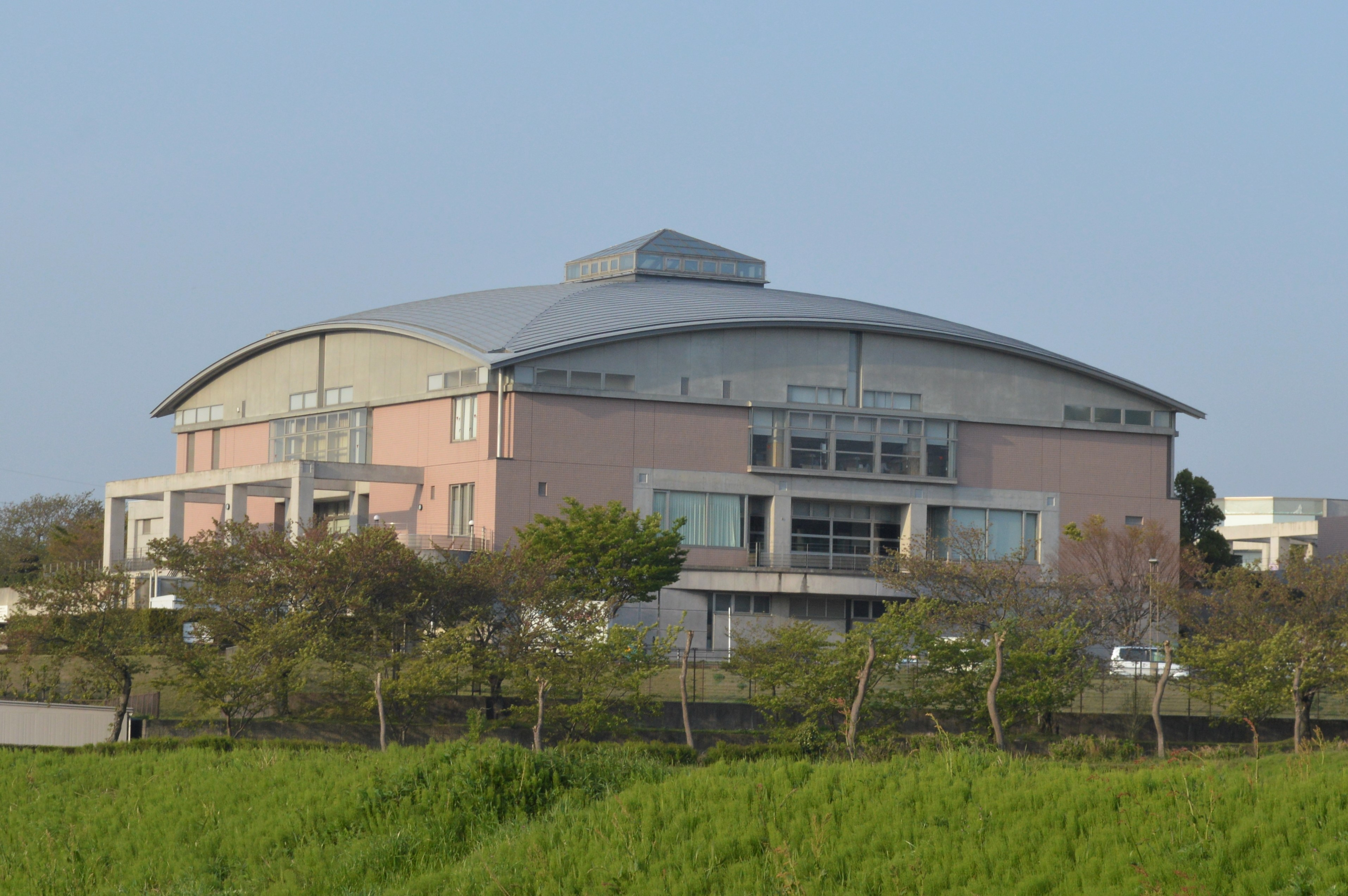 愛知県額田郡幸田町のハッピネス・ヒル・幸田にある幸田町立図書館。